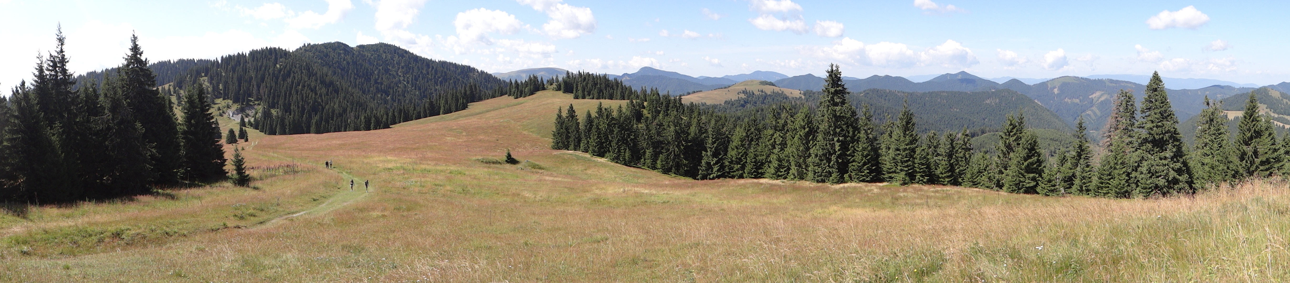 Vyšné Matejkovo